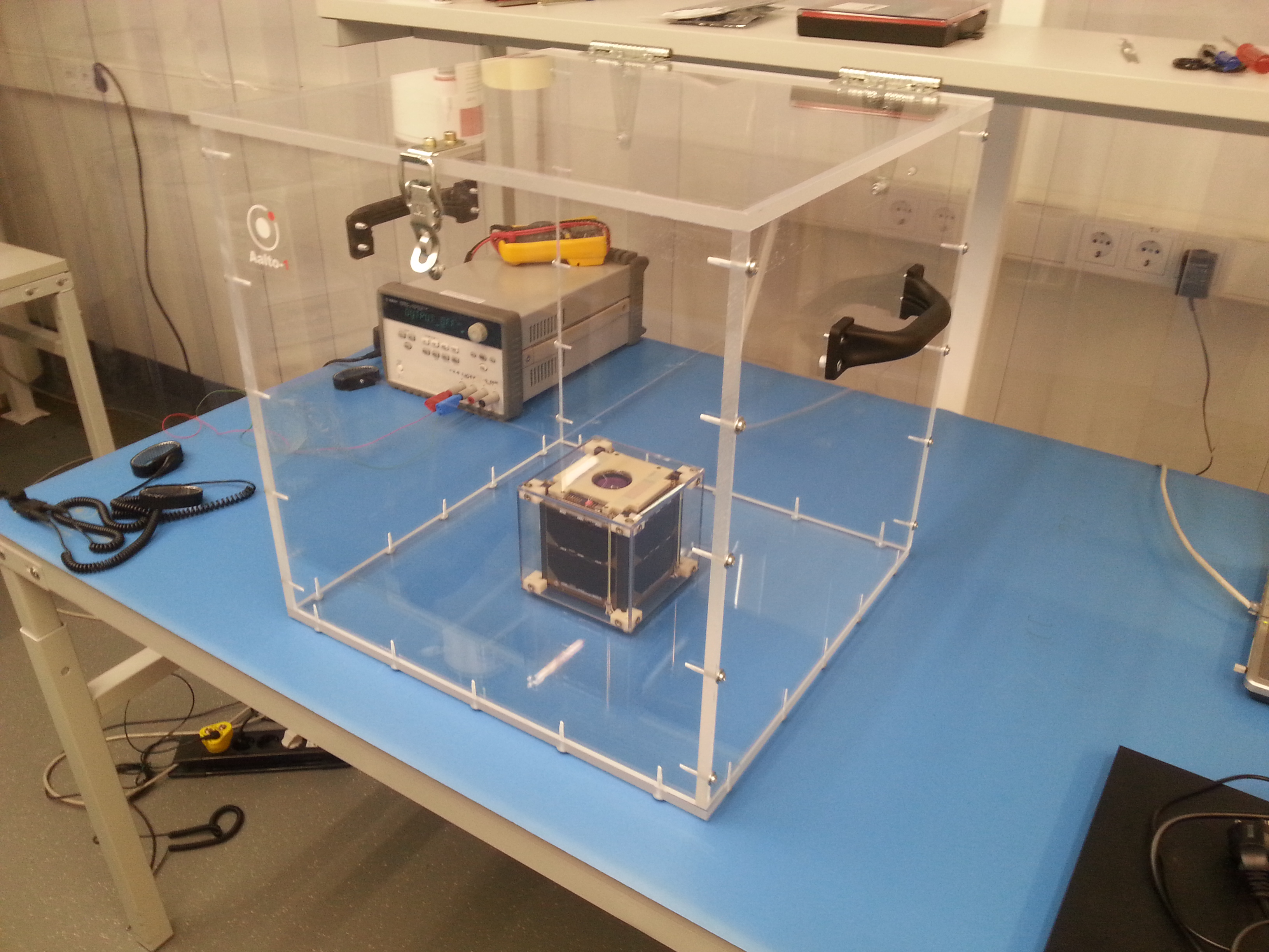 Suomi 100 -satelliitti oli valmis laukaisuun jo syksyllä 2017, mutta Intialaisen PSLV-raketin ongelmien vuoksi laukaisu lykkääntyi. Satelliitti odotti suojassa Aalto-yliopiston satelliittilaboratoriossa elokuuhun 2018 saakka, jolloin se vietiin Alankomaihin laukaisuvälittäjälle.